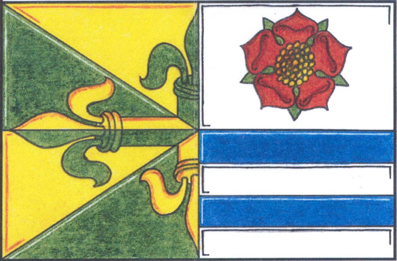 Vlajka obce Dynín